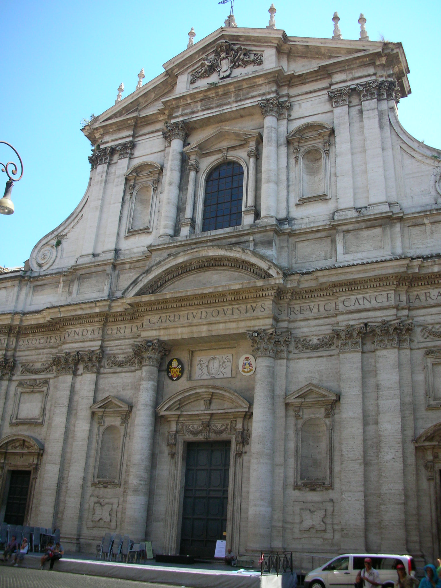 Façade, Sant'Ignazio, Rome